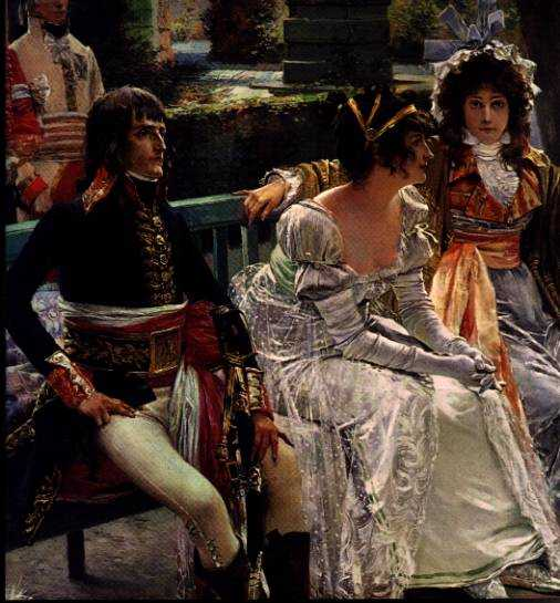 Dipinto raffigurante Napoleone con la prima moglie Giuseppina di Beauharnais.